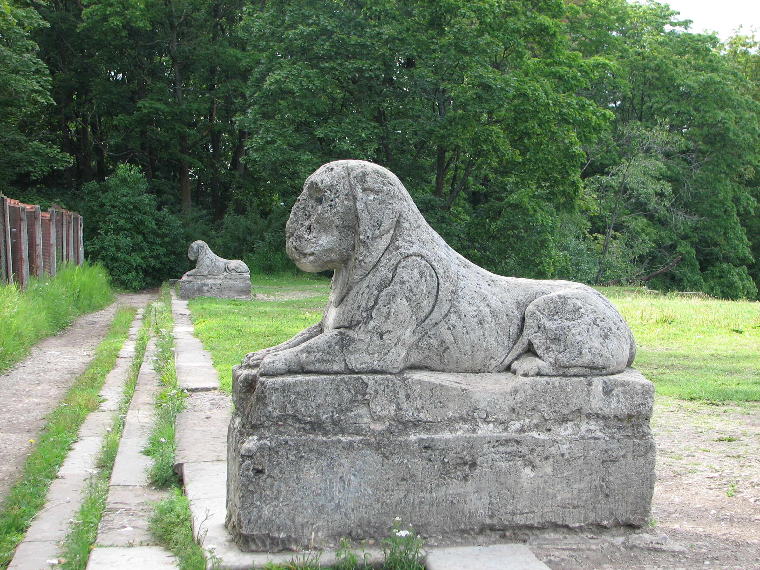 Львы на Террасе-пристани. Gatchina